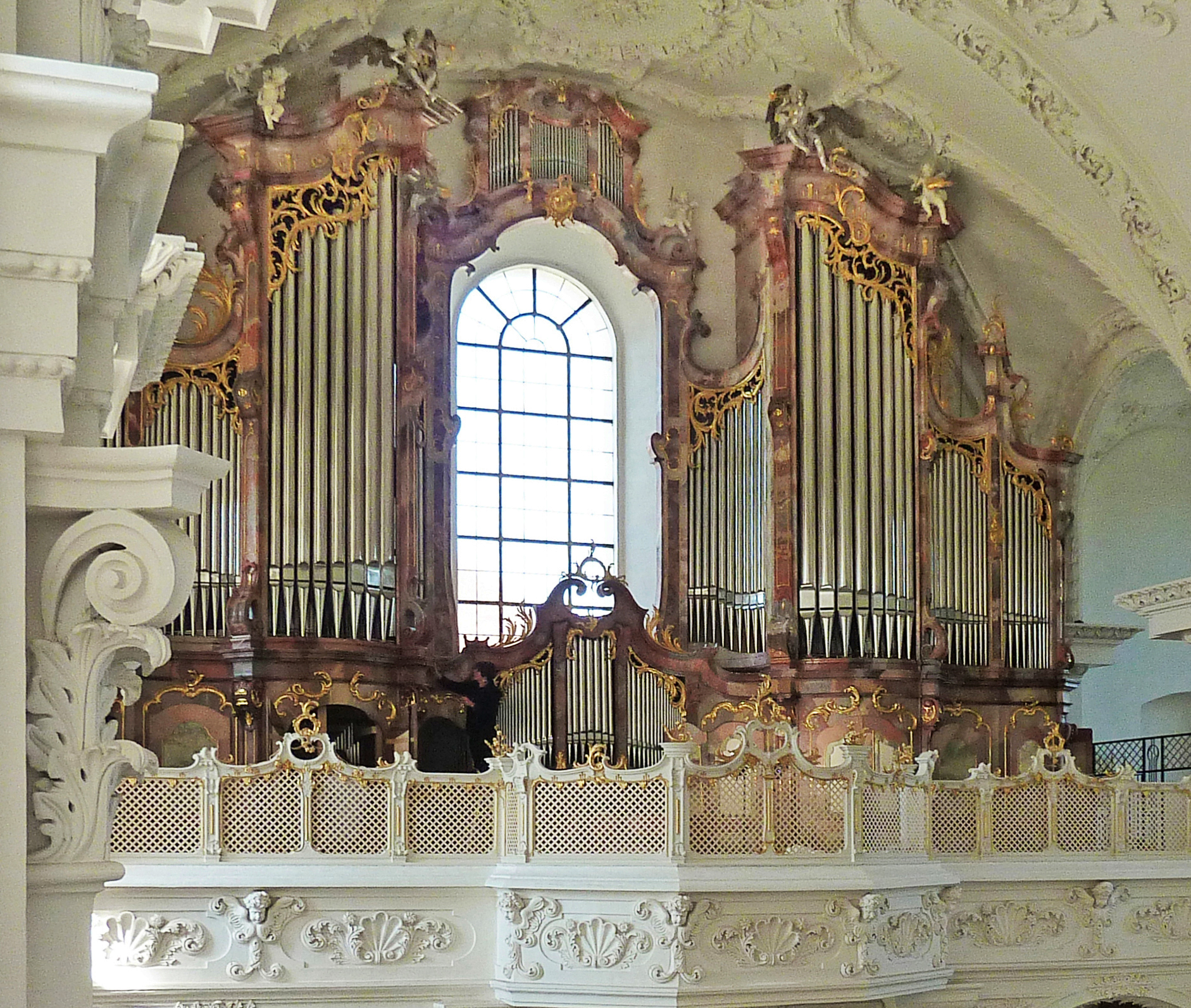 Kloster Obermarchtal, Alb-Donau-Kreis, Baden-Württemberg, Deutschland